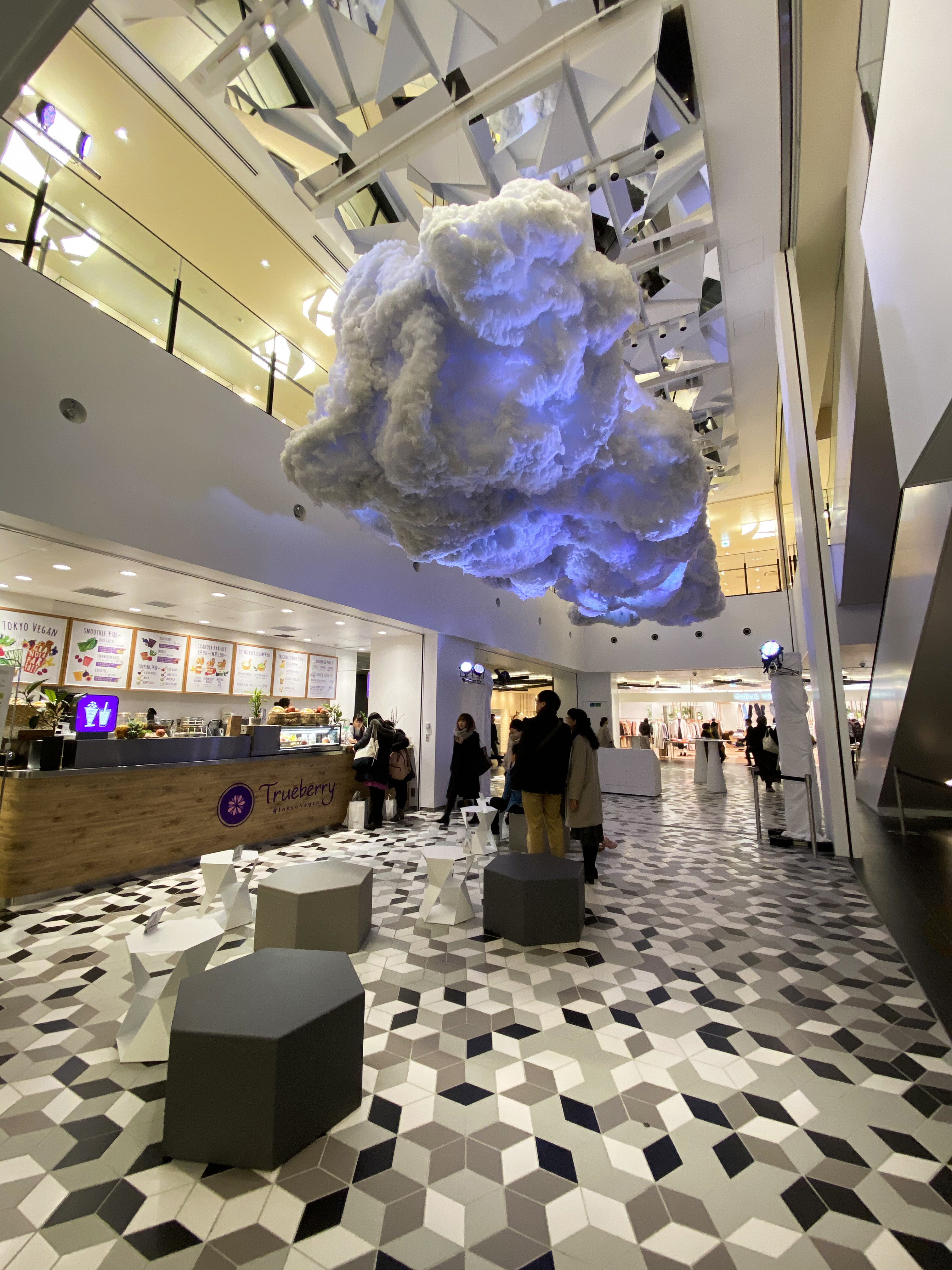 Shibuya Scramble Square Level 7 Atrium